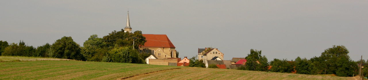 Kolnowice (dodatkowa nazwa w j. niem. Kohlsdorf) - wieś w Polsce położona w województwie opolskim, w powiecie prudnickim, w gminie Biała.